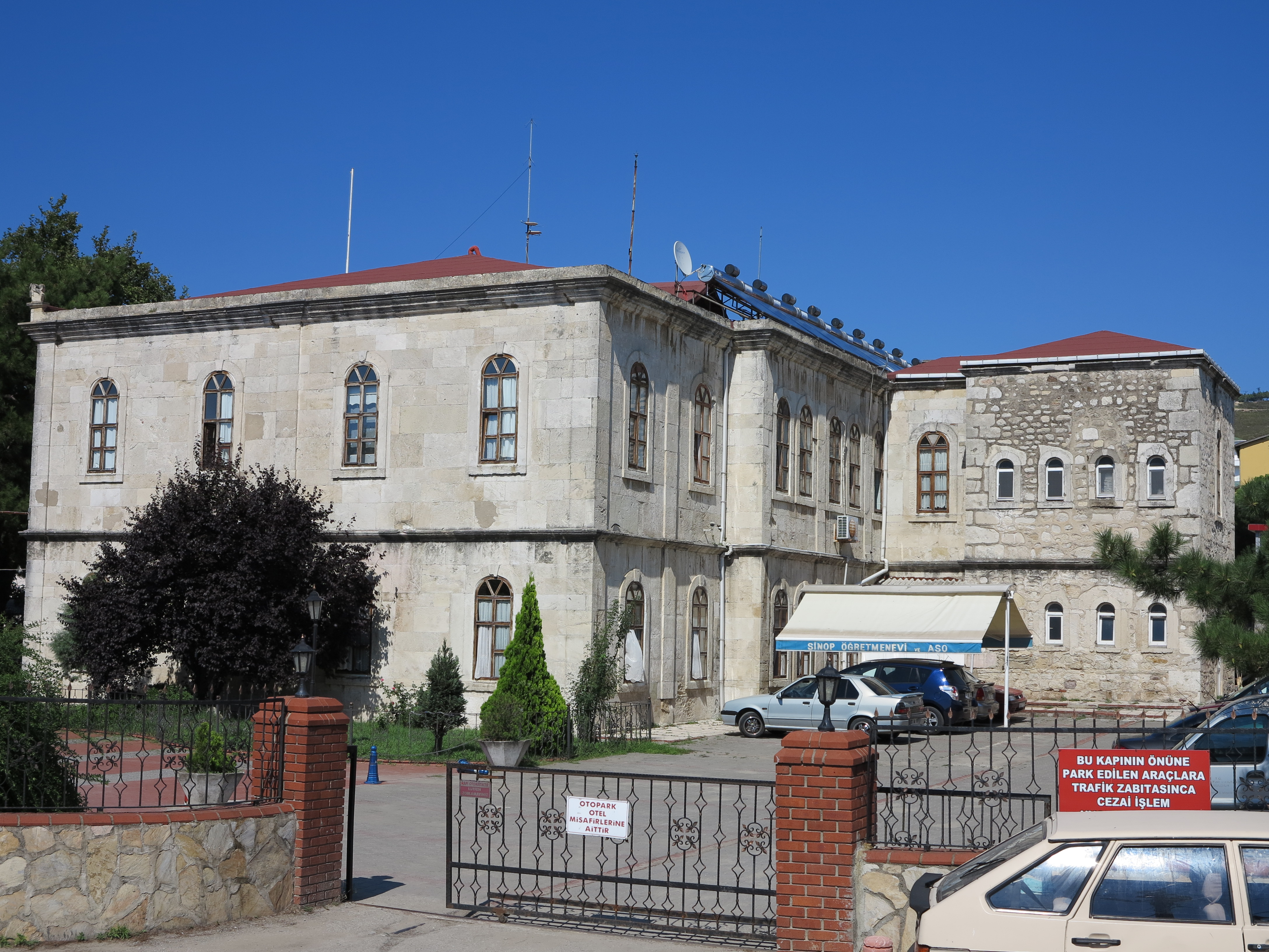 SINOP OGRETMEN EVI